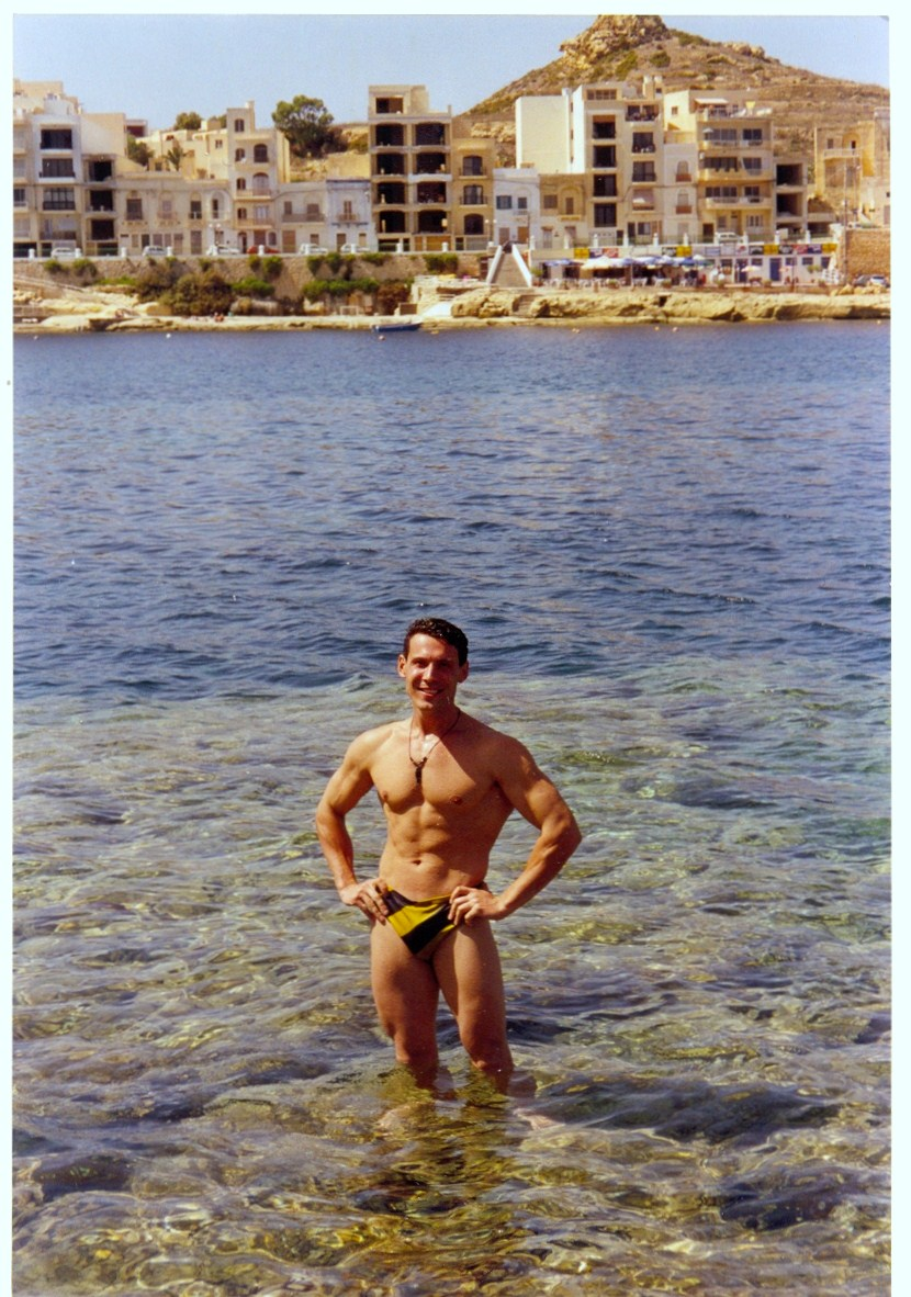 Альберт Кордина